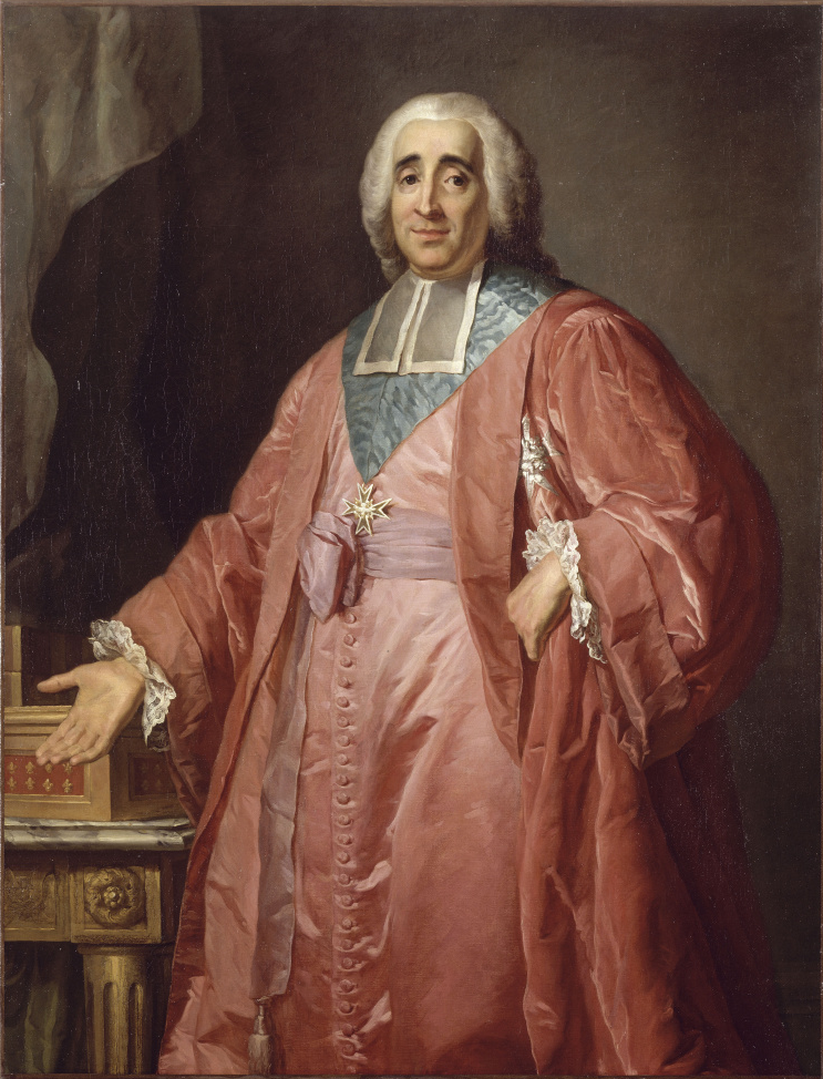 Portrait en pied, en robe de chancelier de France, le Saint-Esprit sur la poitrine, la main ouverte devant la cassette des sceaux posée sur une table.